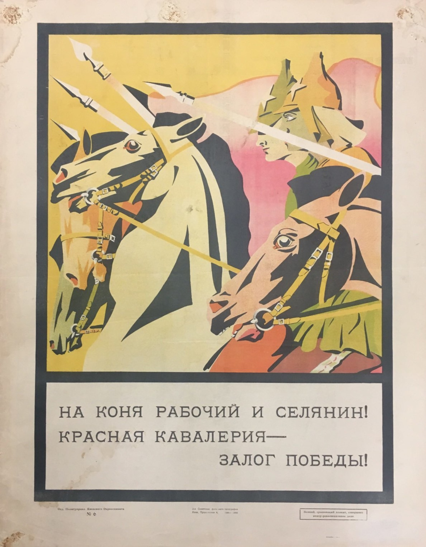 Красный плакат Гражданской войны